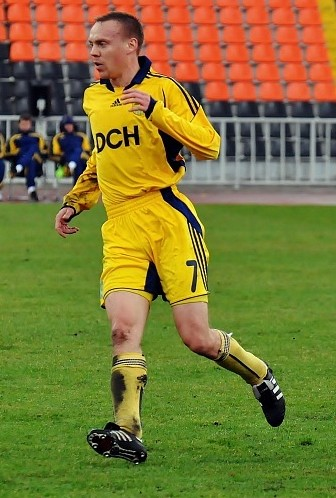 Сергей Валентинович Валяев — украинский футболист.